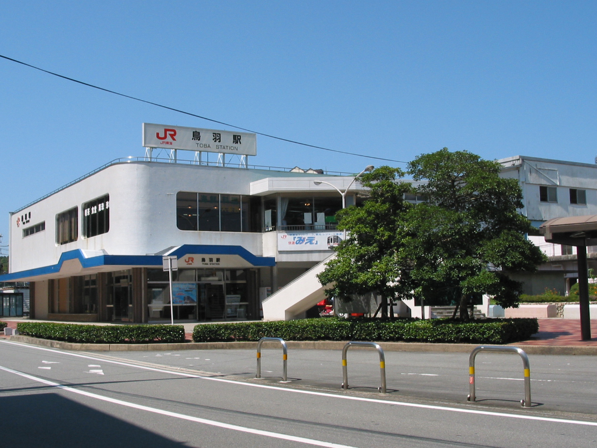 鳥羽駅JR側（市街側）出入口。 2006/09/03 三重県鳥羽市鳥羽１丁目の鳥羽駅にて撮影。 投稿者が撮影